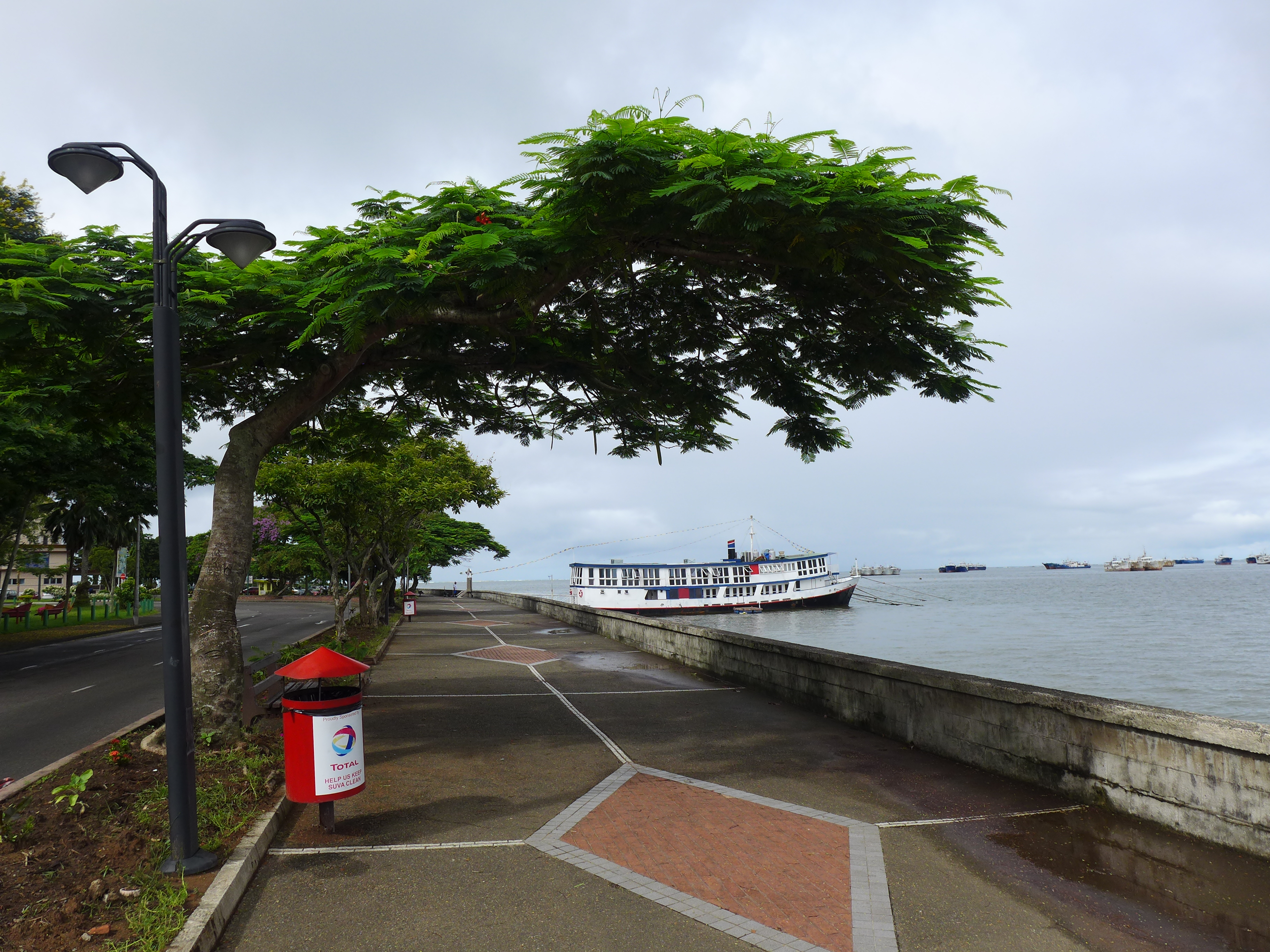 Suva (Fiji) - Promenade mit Blick über ankernde Schiffe im Hafen